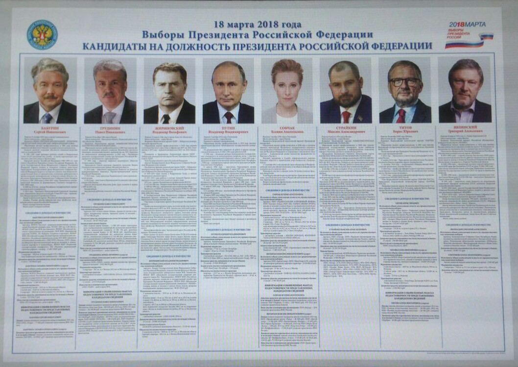 Плакат «Кандидаты на должность Президента Российской Федерации 2018 года»